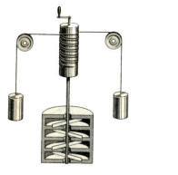 Montaje experimental para la determinación del equivalente mecánico del calor s